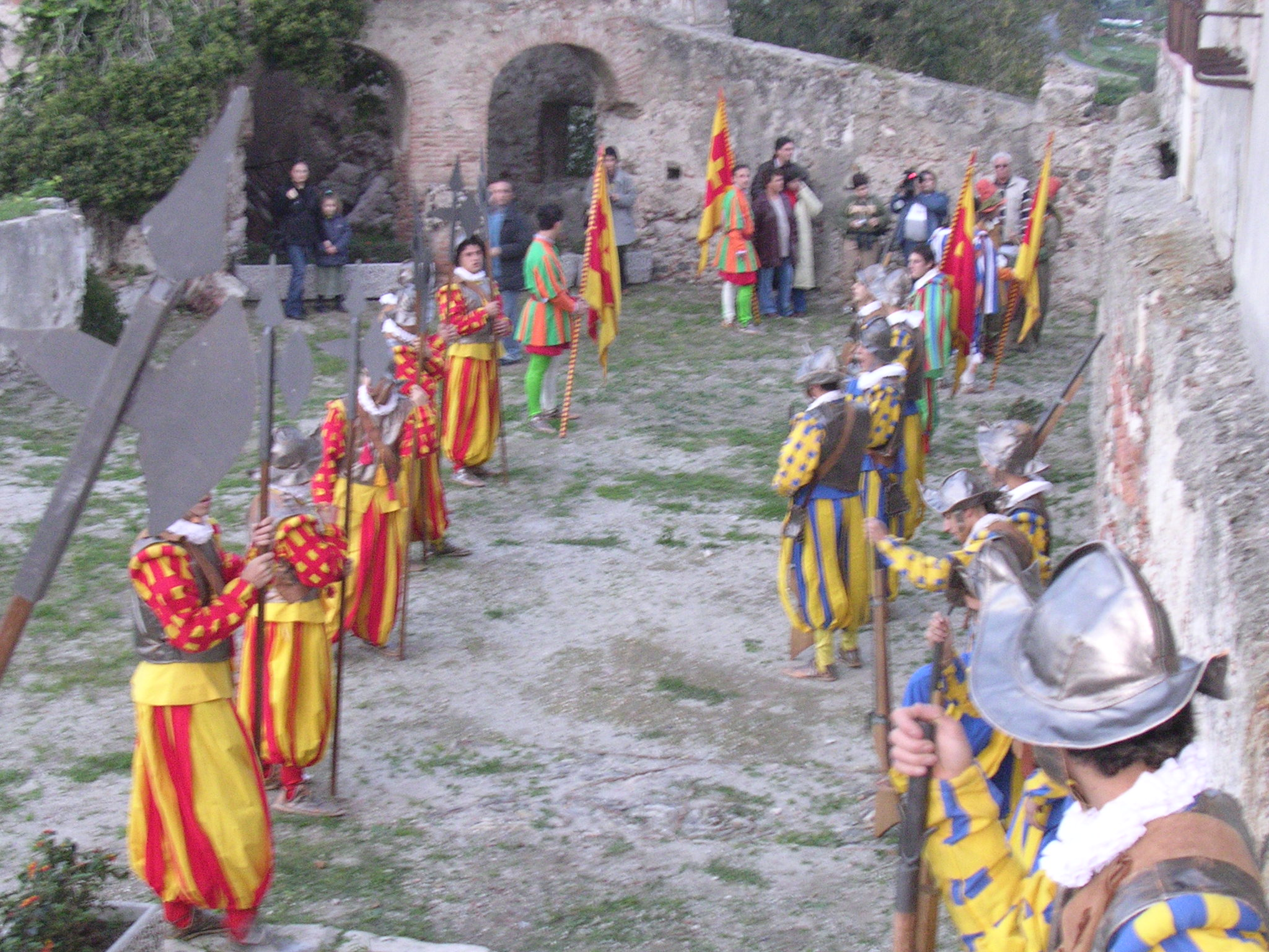 Corteo Storico Festa S. Nicola 5 dicembre (foto Riccardo Ramuglia)